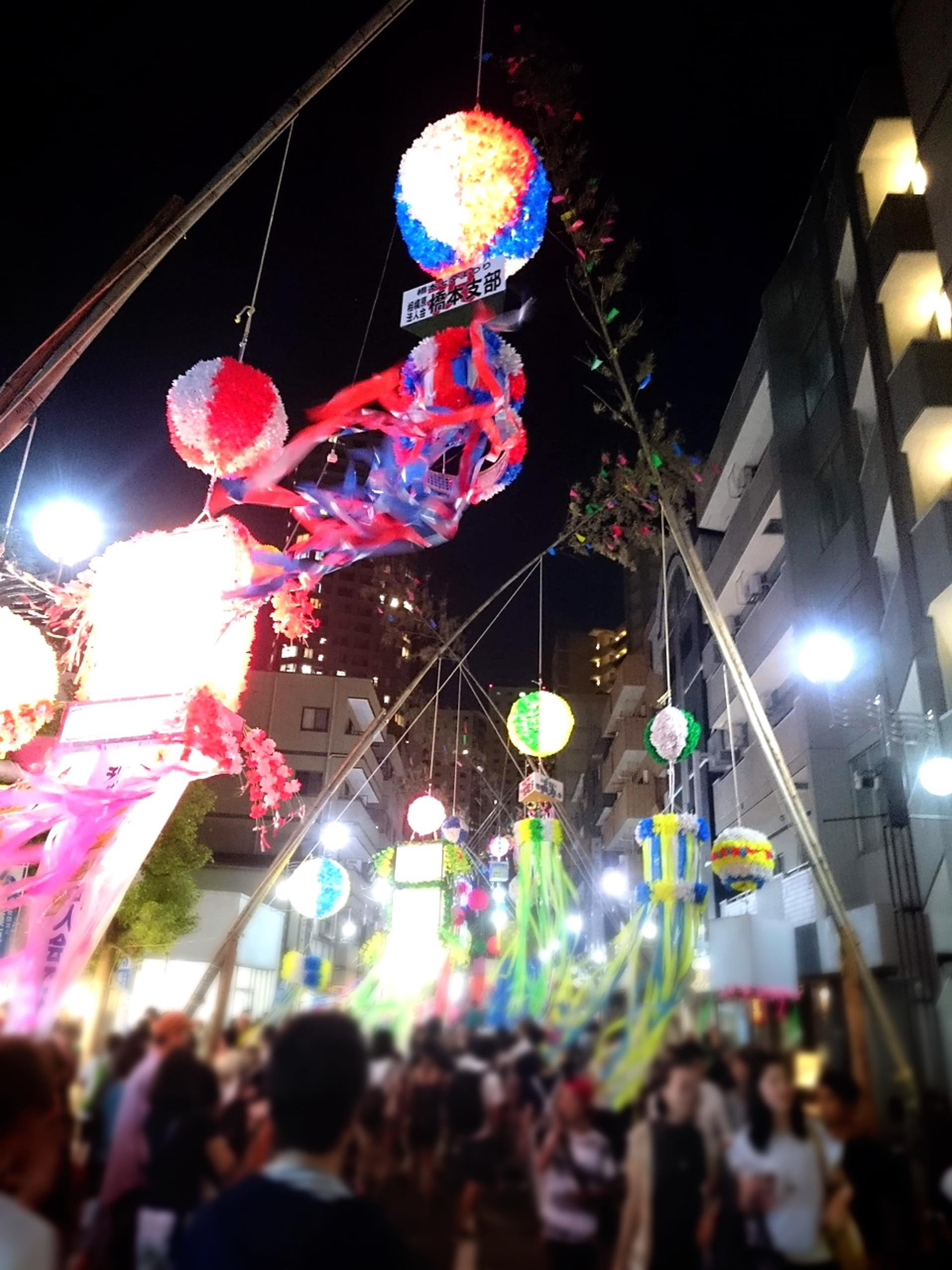 第65回橋本七夕まつりの様子